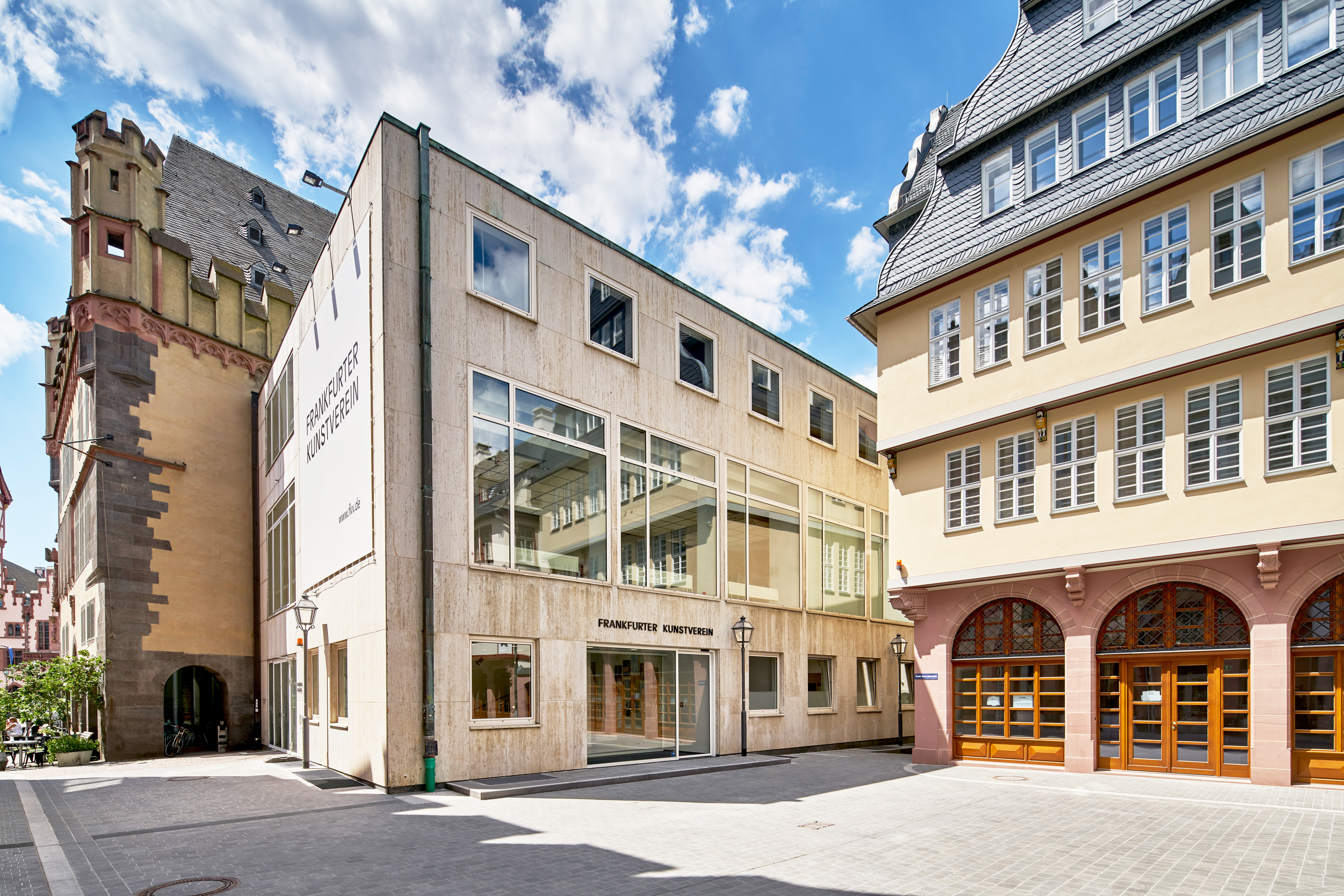 Haus des Frankfurter Kunstvereins mit Anbau im Dom-Römer-Areal